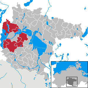 Amt Malchow-Land in Mecklenburg-Western Pomerania - District Müritz